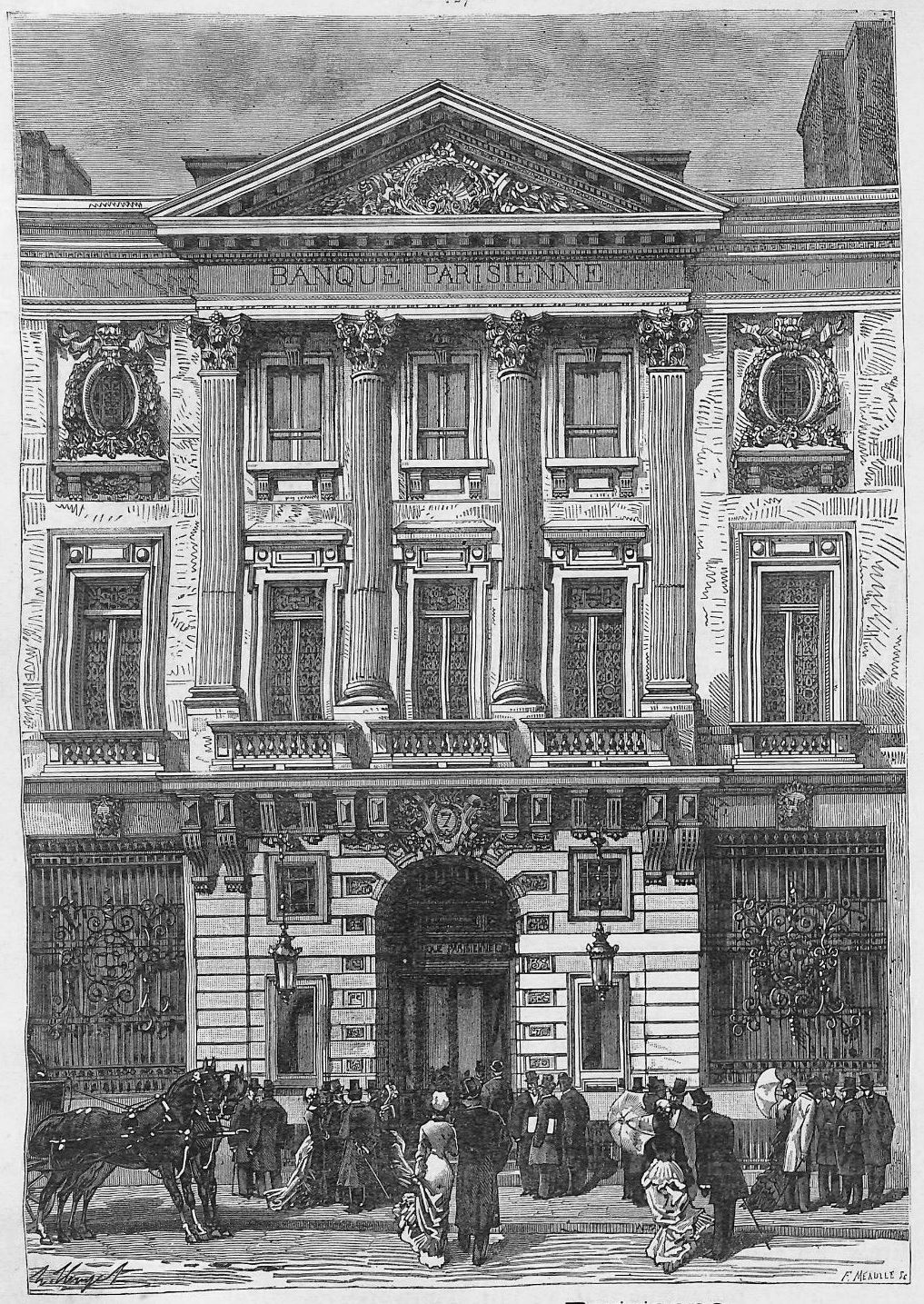 "Hôtel de la Banque Parisienne, 7, rue Chauchat (terrains de l'ancien opéra)".